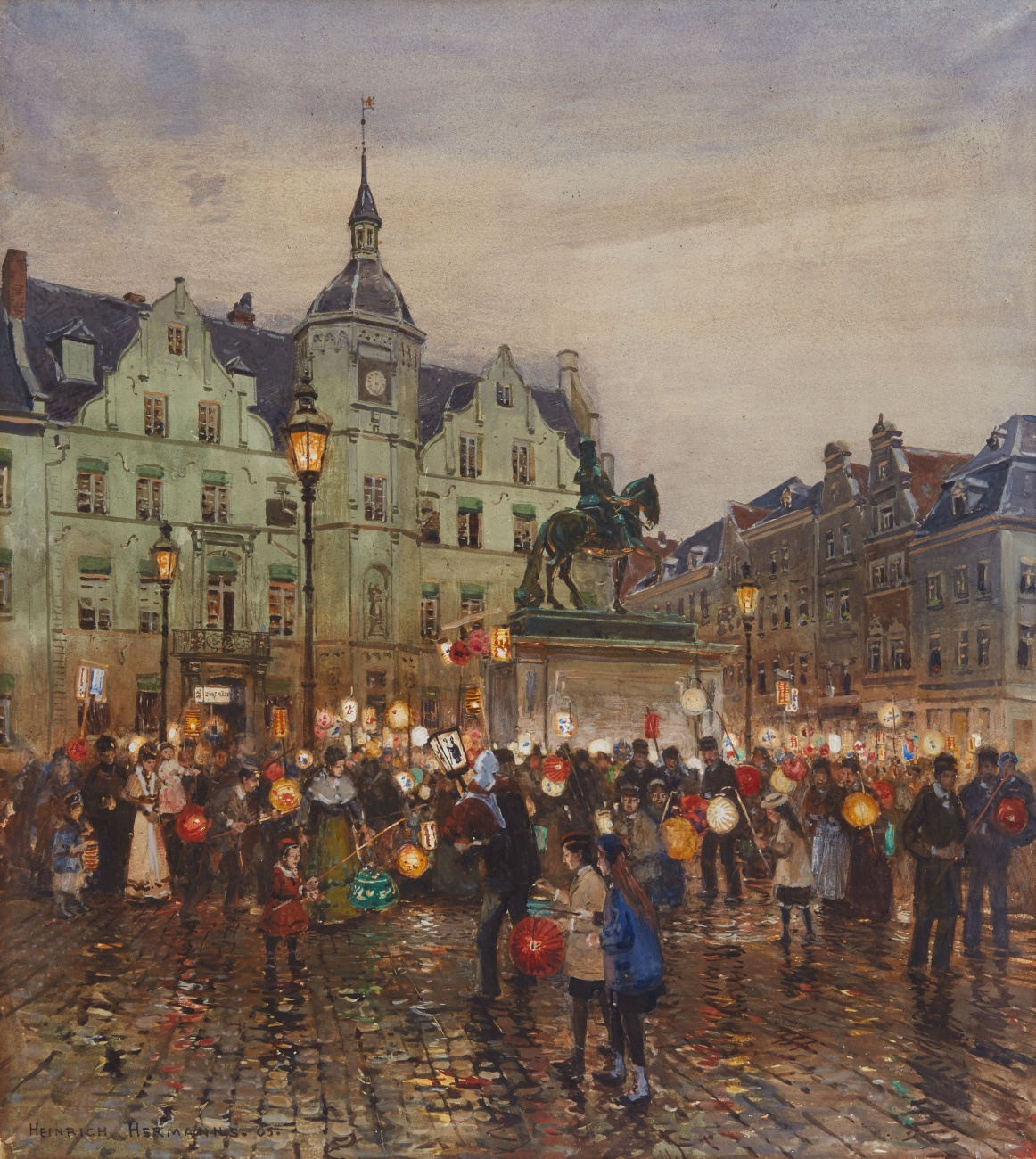 Sankt-Martins-Zug vor dem Düsseldorfer Rathaus. Aquarell auf Papier, auf Keilrahmen aufgezogen. 58 x 52,5 cm. Signiert und datiert unten links: Heinrich Hermans 05.